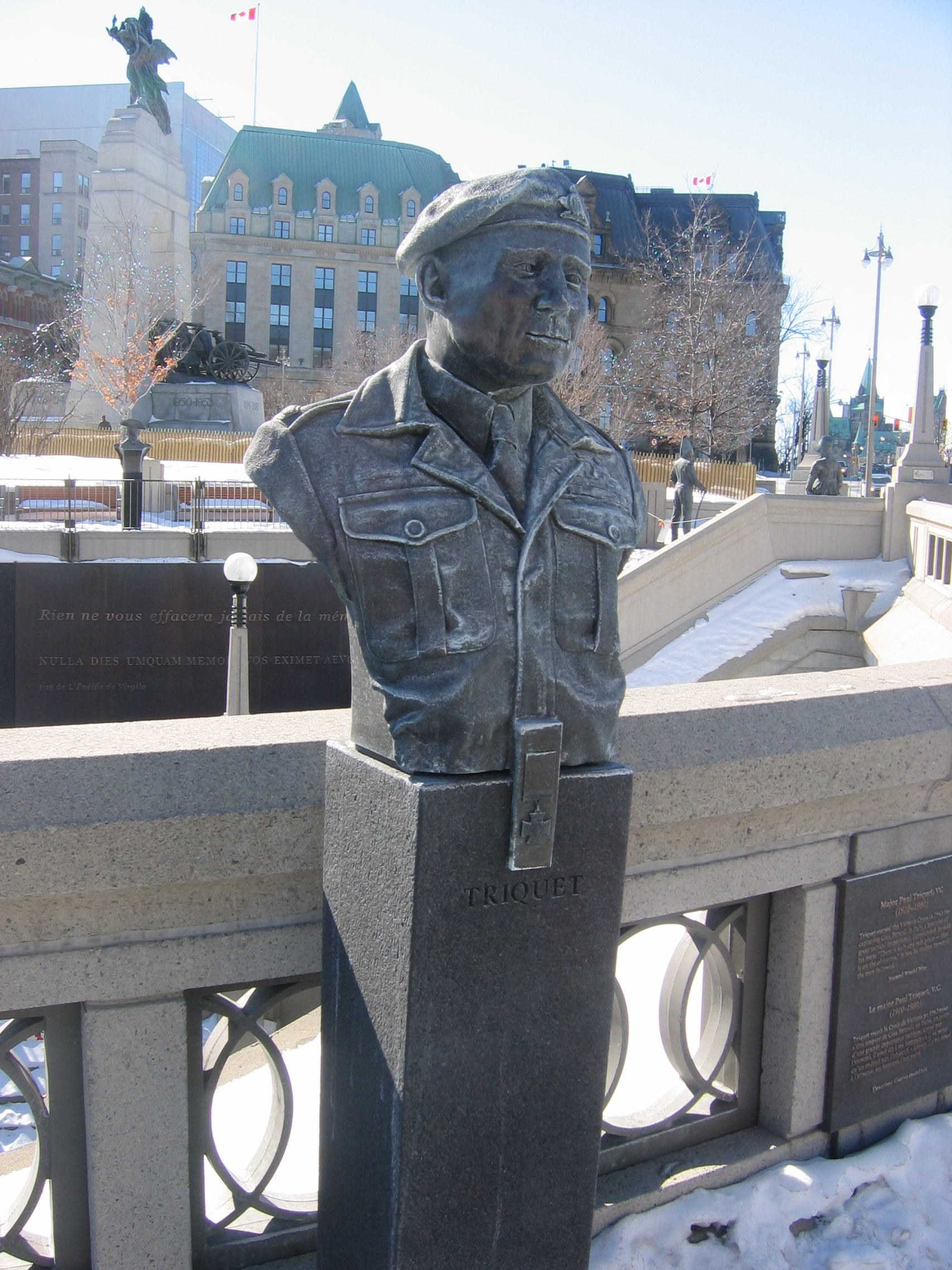 Statue de Paul Triquet à Ottawa.